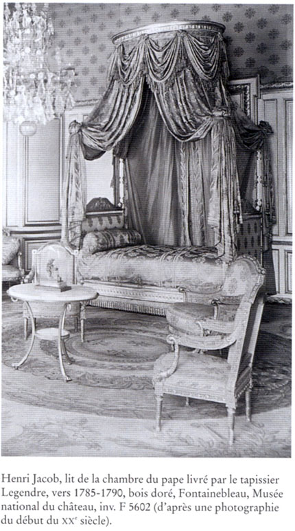 Photographe non identifié (France): photographie de la chambre du pape Pie VII au château de Fontainebleau, France, portant la légende Henri Jacob, lit de la chambre du pape, livré par le tapissier Legendre, vers 1785-1790, bois doré, Fontainebleau, Musée national du château, inv. F 5602 (d'après une photographie du début du [XIXe] siècle. Lit de travers